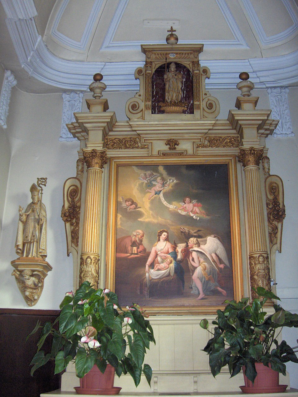 right side altar; Sint-Annakerk; Stene, Ostend, Belgum